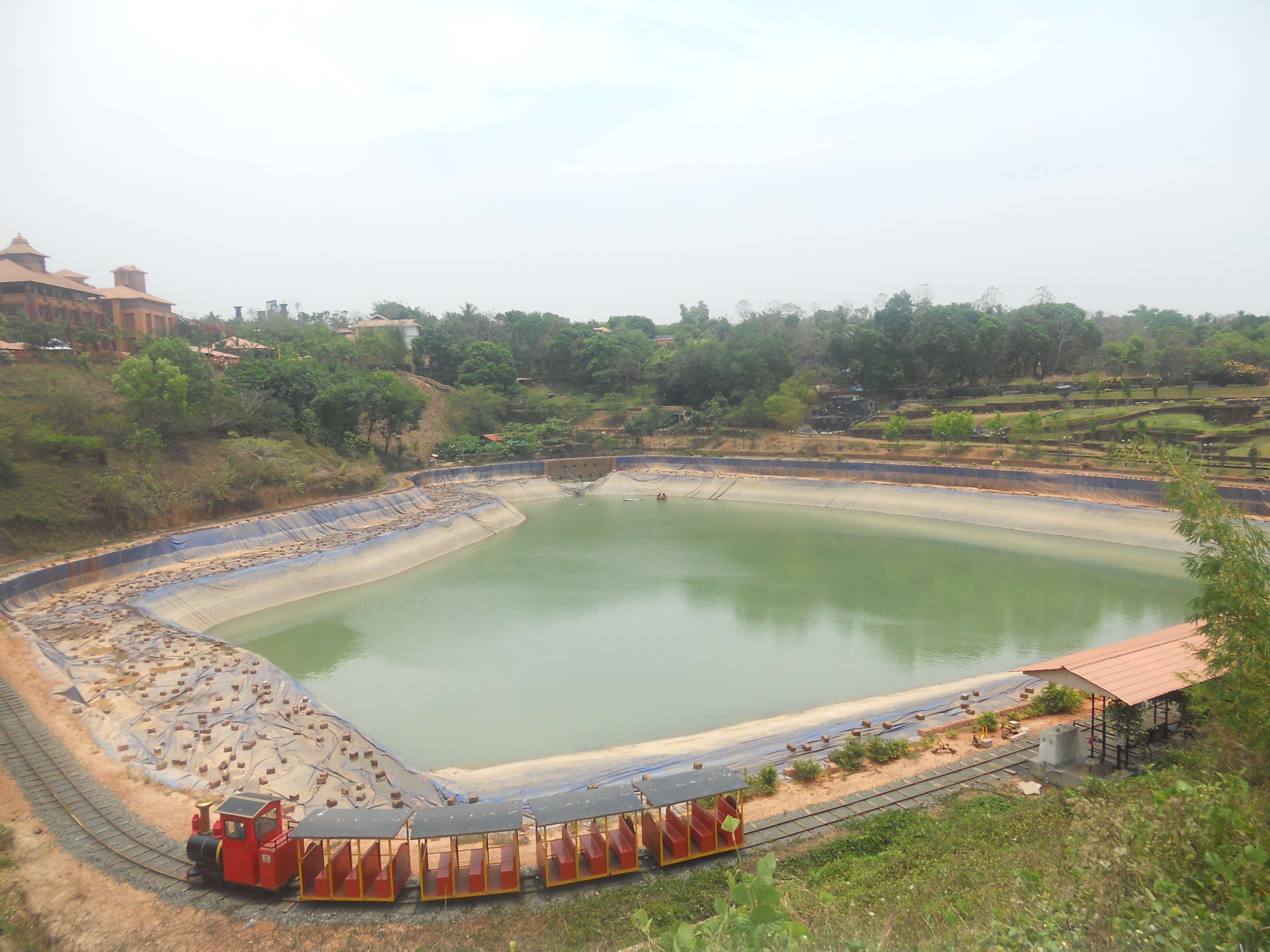 പറശ്ശിനിക്കടവു് വിസ്മയ പാർക്കിലെ മഴവെള്ള സംഭരണി